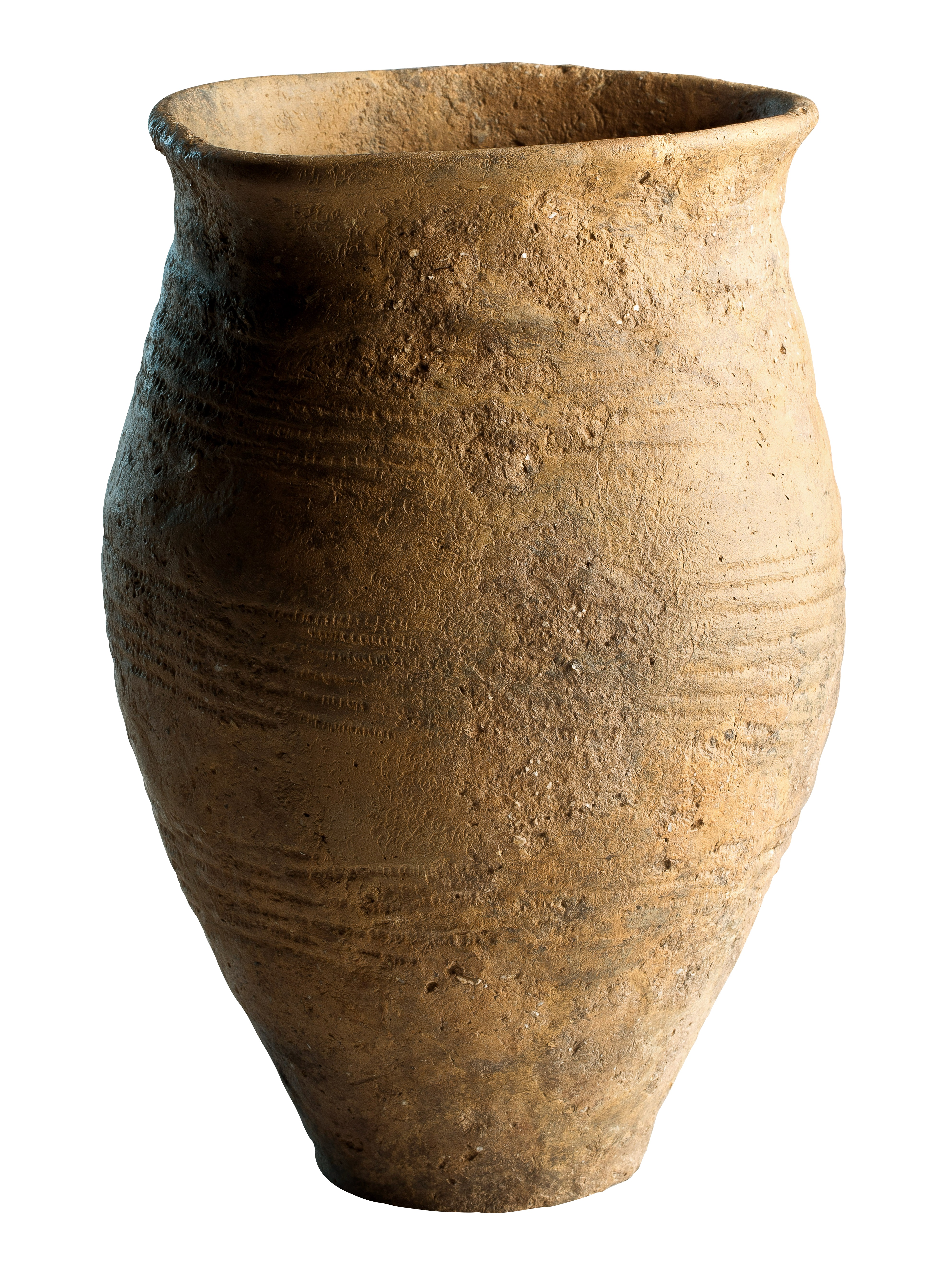 Wikkeldraadbeker in handgevormd aardewerk, 2000 tot 1750 VC, vindplaats: Neerharen/Rekem, Het Kamp (Hangveld), 1985, kuil binnen kringgreppel, collectie Gallo-Romeins Museum Tongeren, 85.RE.10